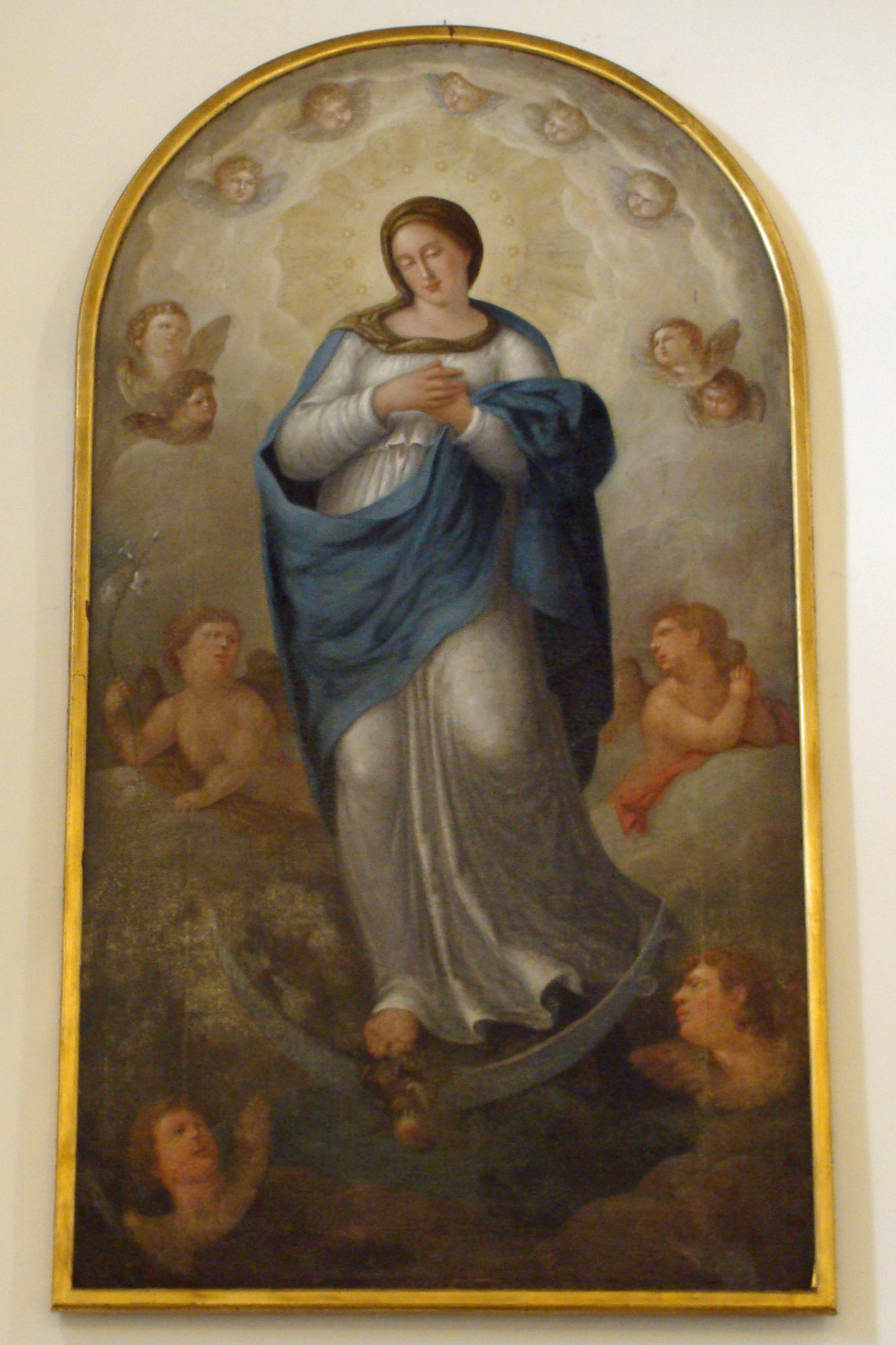 peinture représentant la vierge Marie, église catholique de Monteaperta, commune de Taipana, province d'Udine (Italie)